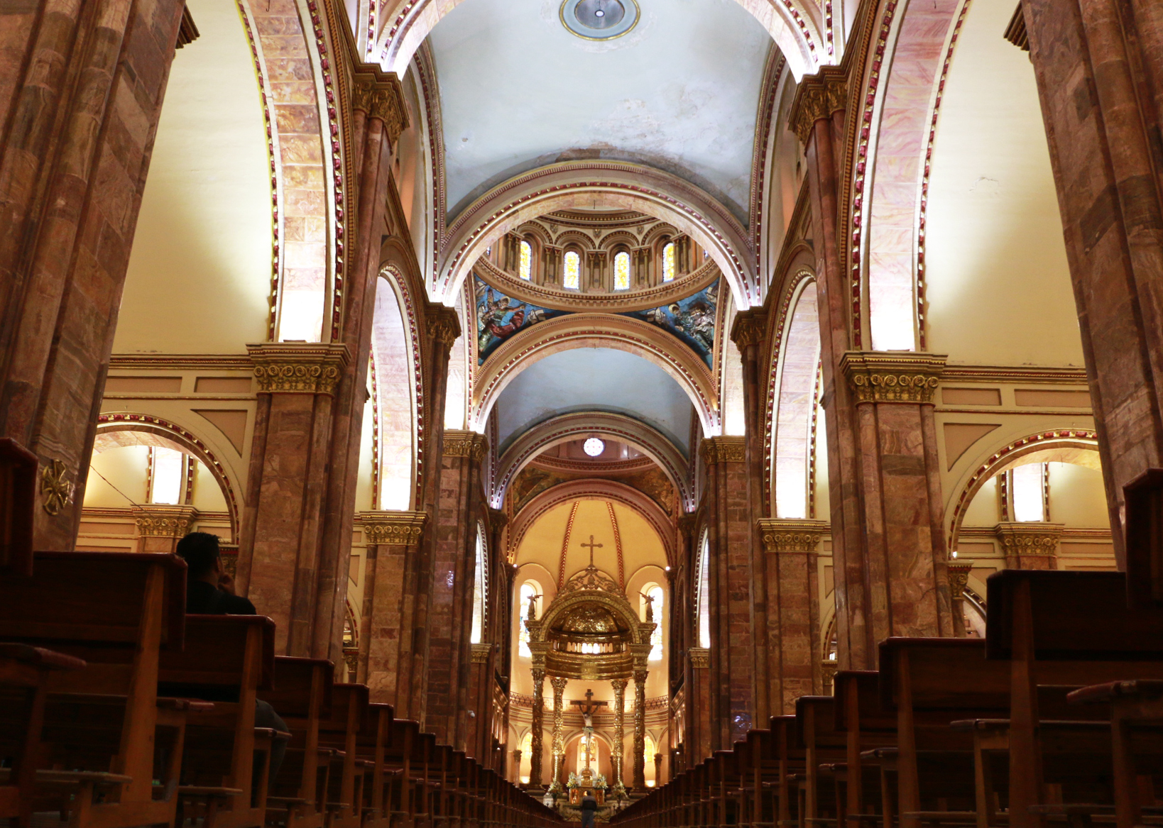 Hubicada en Cuanca - Ecuador, Es una iglesisa de estilo gótico renacentista con tres cúpulas que sobresalen del tejado, inspirada en la Basílica de San Pedro en Roma.Es uno de los más grandes atractivos arquitectónicos del país, caben 8000 personas en su interior.